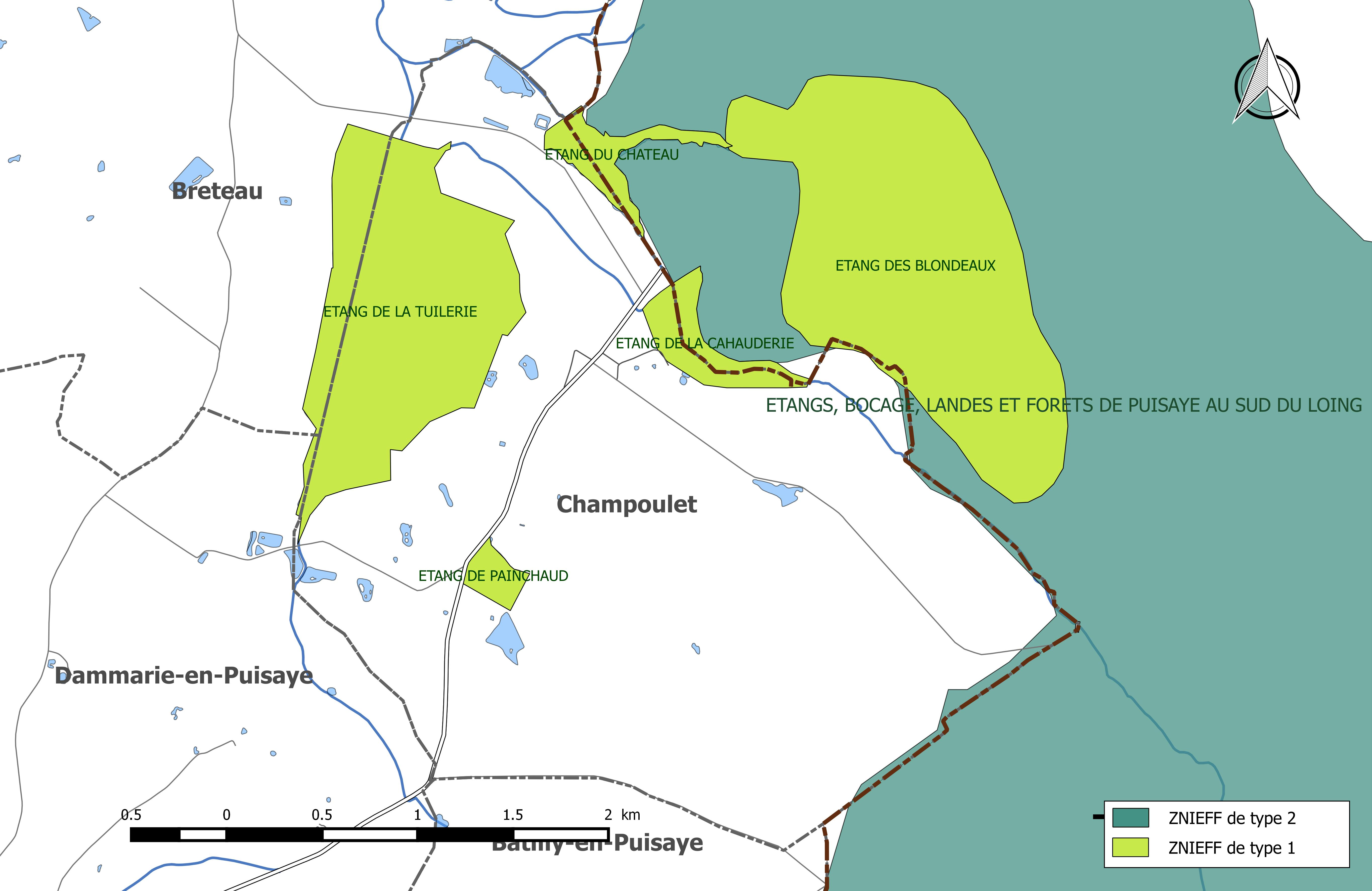 Carte des Zones naturelles d'intérêt écologique faunistique et Floristique (ZNIEFF) de la commune de Champoulet.